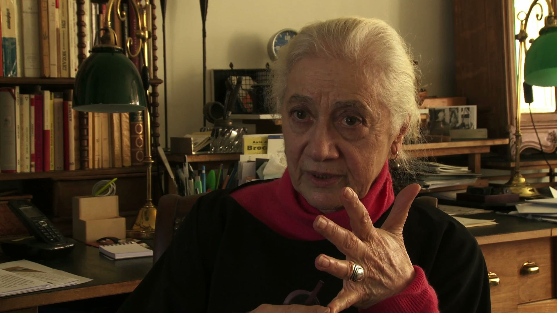 Isabelle Sadoyan témoigne dans le film de Daniel Cling